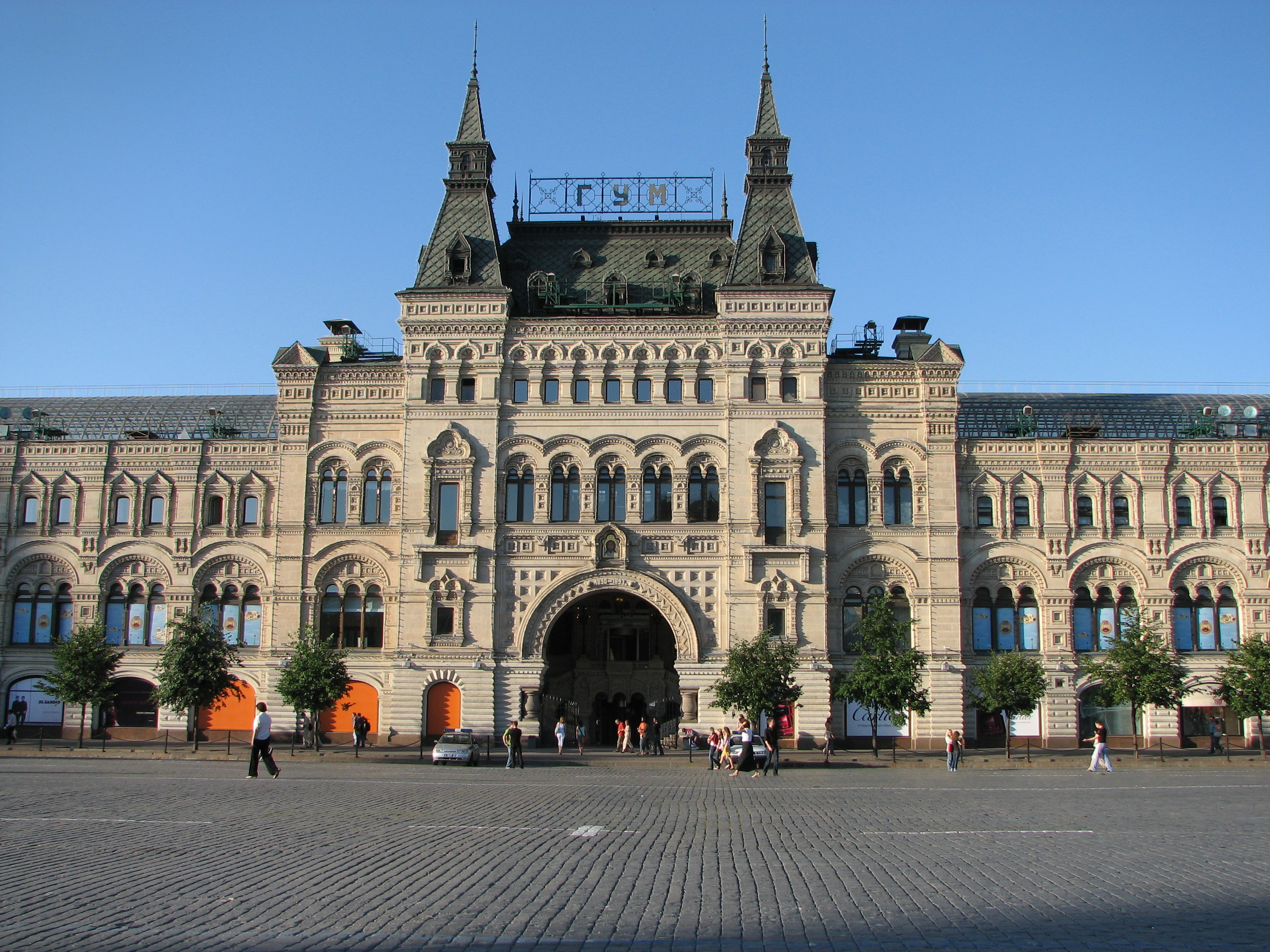 Entrée principale du Goum Main gate on the front of Gum